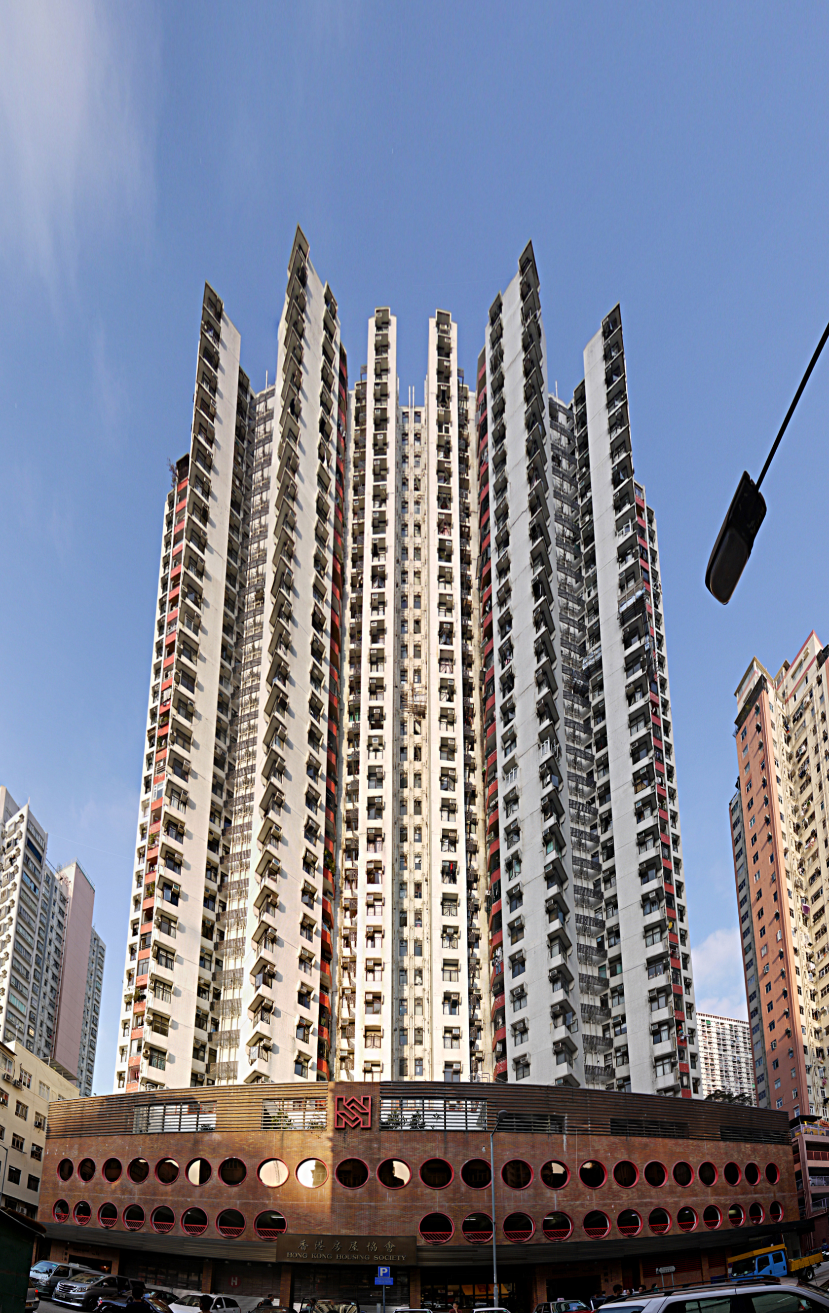 中文（香港）: 龍濤苑及房協區域辦事處外貌